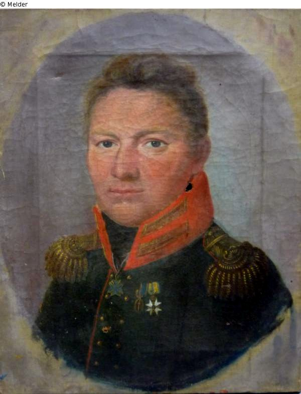 Brustbild "Oberst von Müller", 30 cm x 24 cm, Öl auf Leinwand, Standort: Staatliches Museum Schwerin